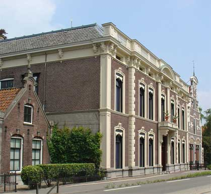 Museum Bisdom van Vliet te Haastrecht Licensing Categorie:Afbeelding Zuid-Holland